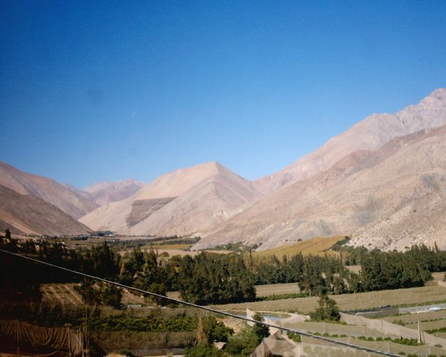 Fotografía de una zona del Valle del Elqui. Año 2006.